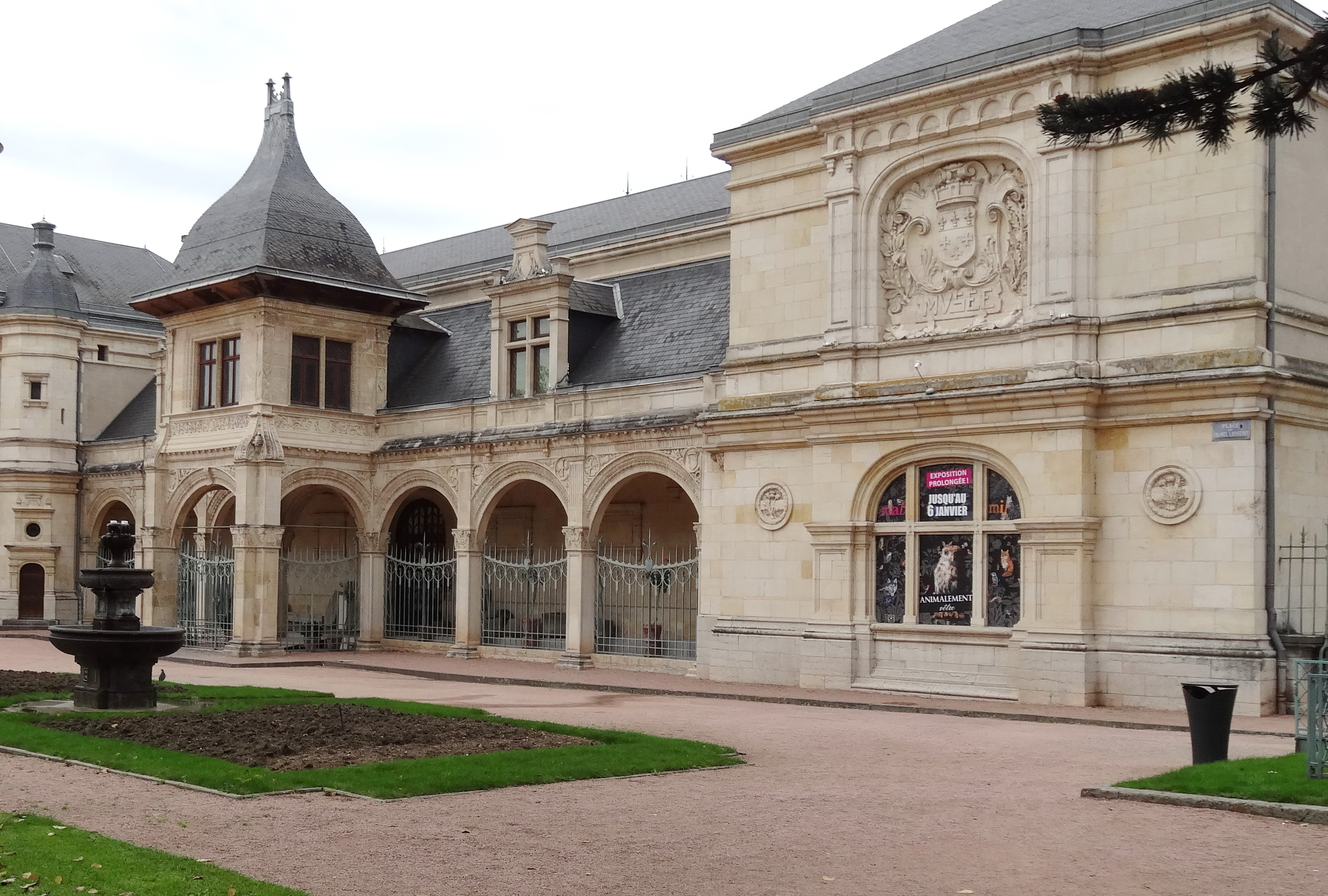 Musée départemental et municipal Anne-de-Beaujeu (dans l'ancien Pavillon Anne de Beaujeu). Moulins, Allier